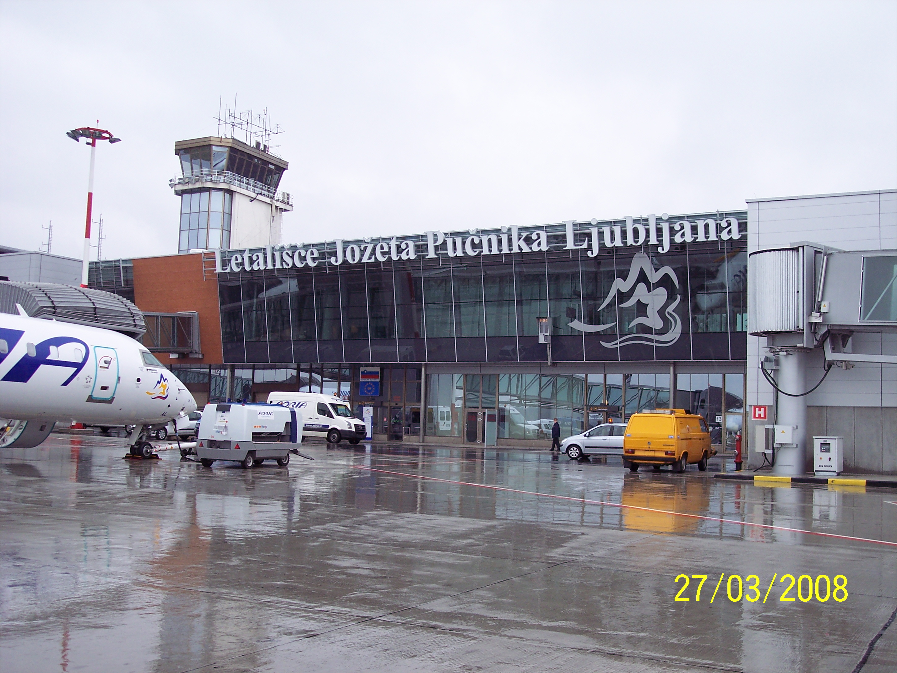 LETALISCE JOZETA PUCNICA(Bırnik).LJUBLJANA